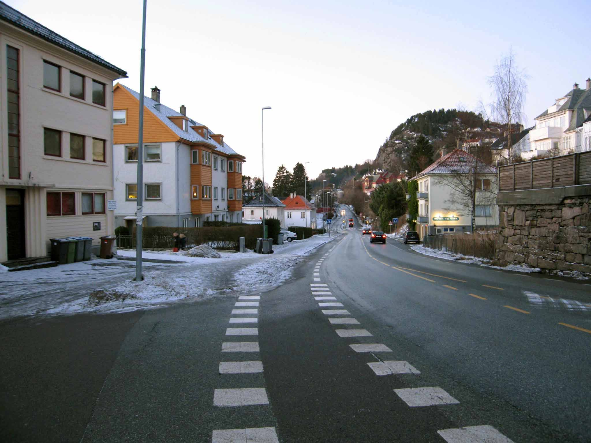 Helleveien